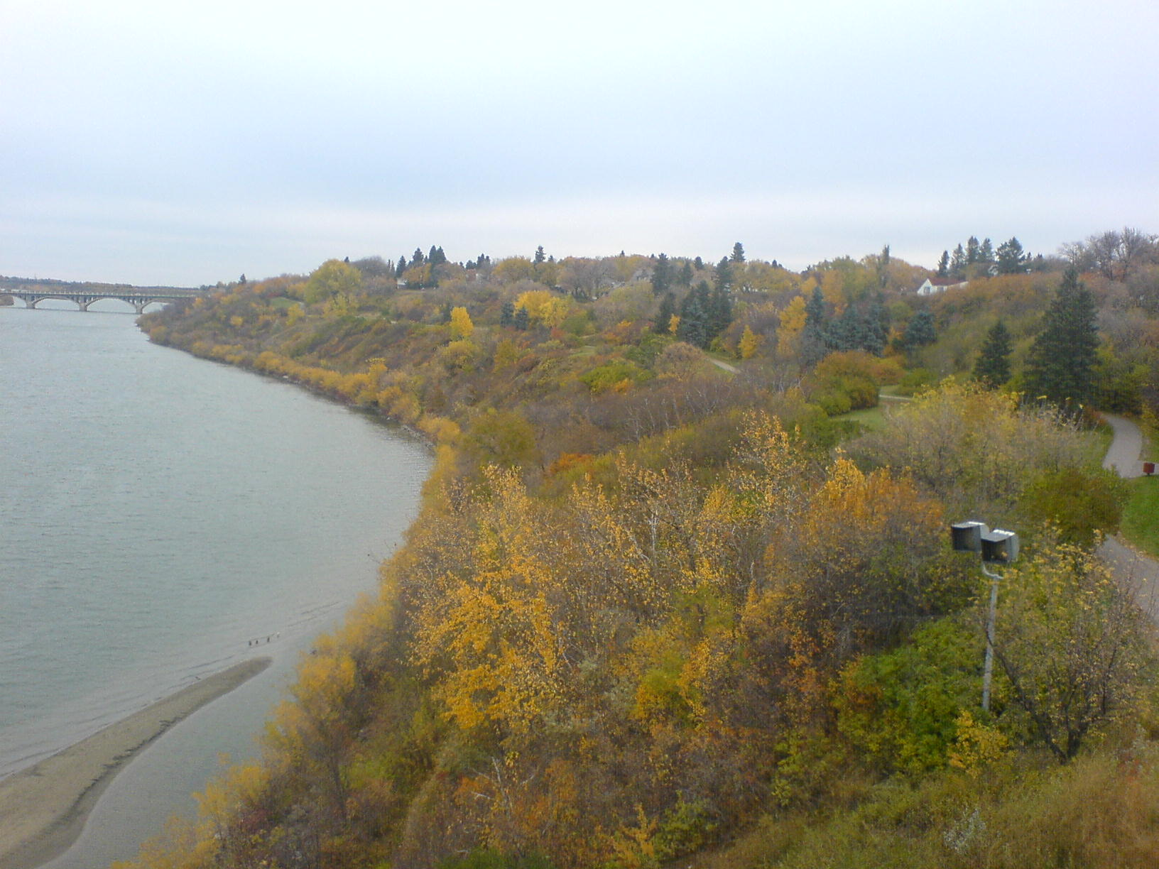 La rive de la riviere Sask. Sud. en Automne Saskatooon, Canada